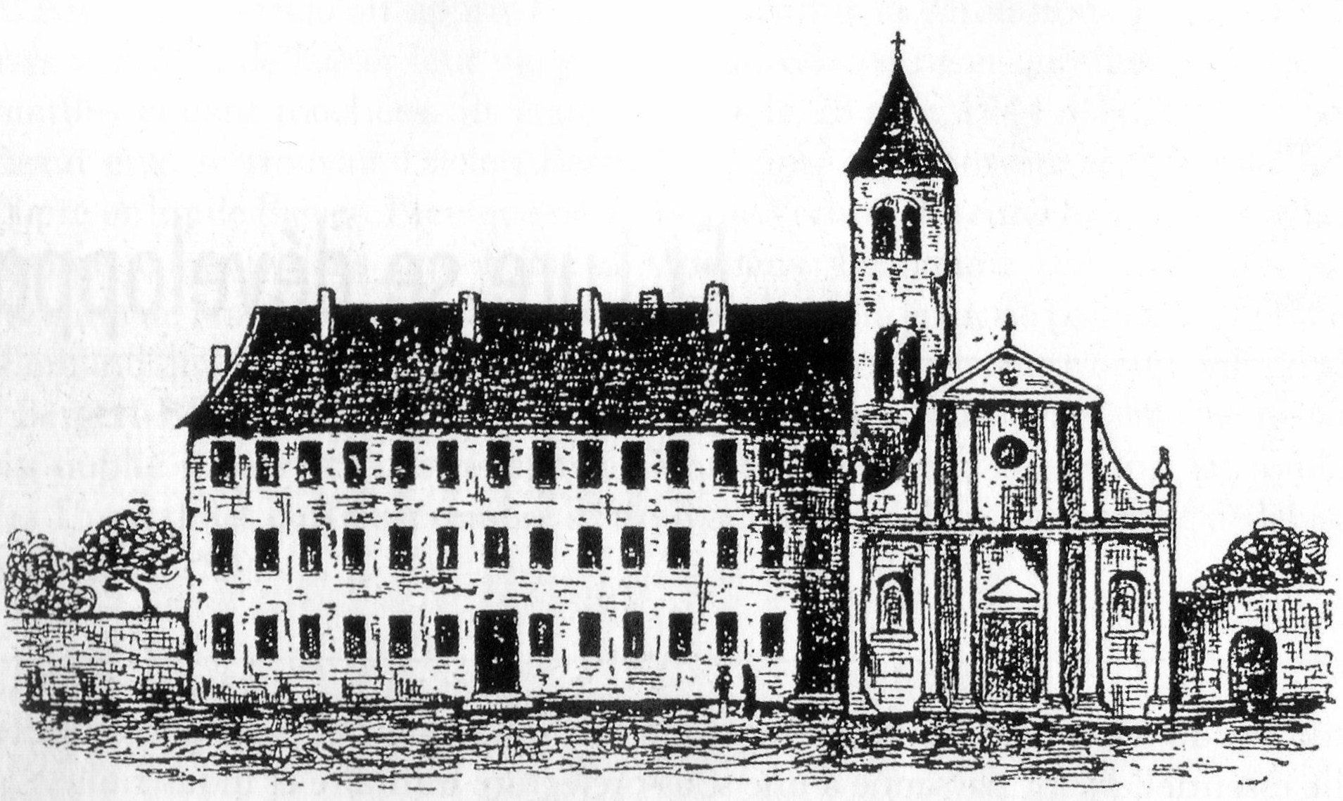 Cf titre